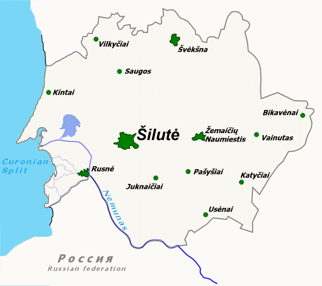 Šilutė district municipality